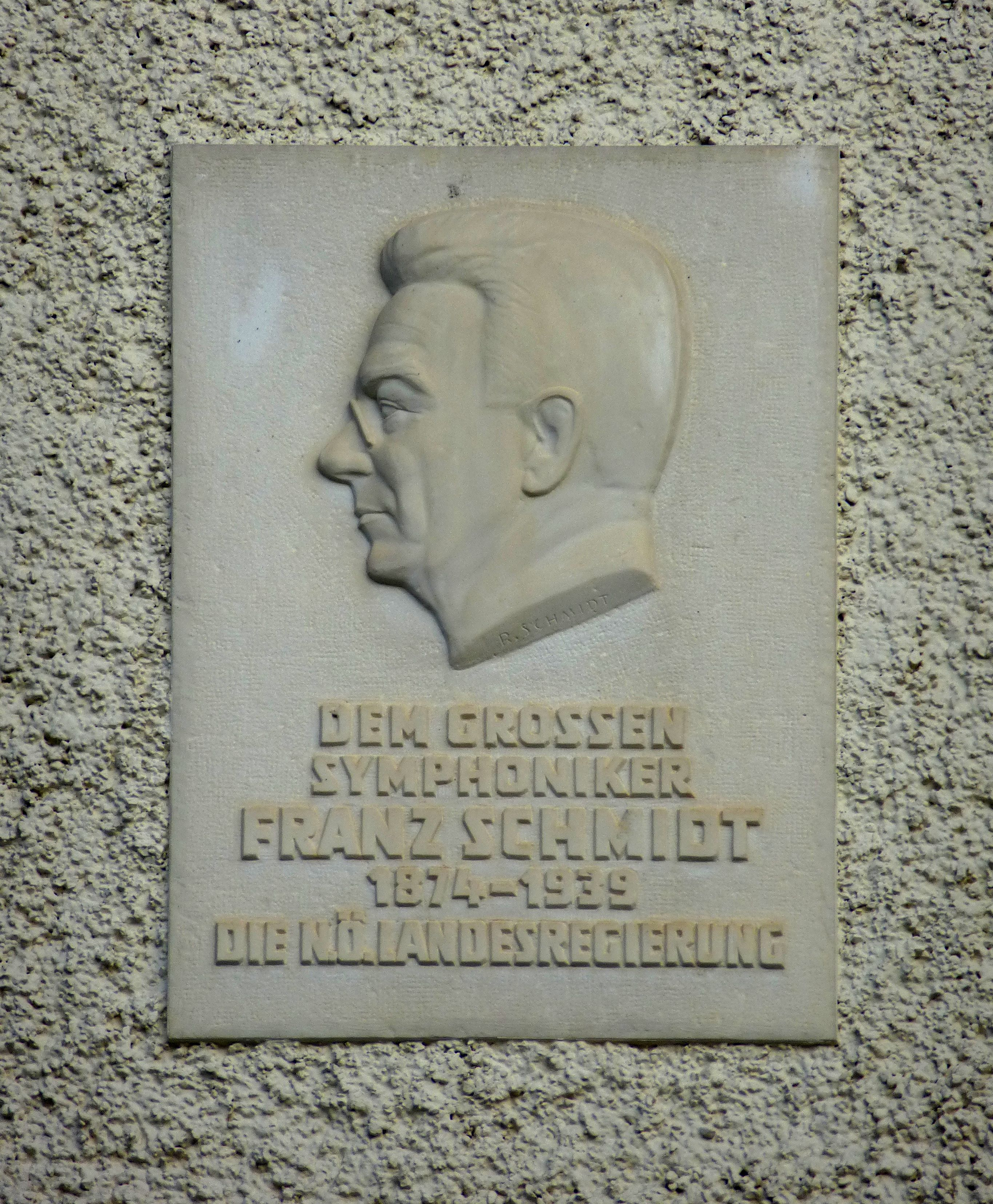 Franz-Schmidt-Villa; Info-Tafel an der Fassade